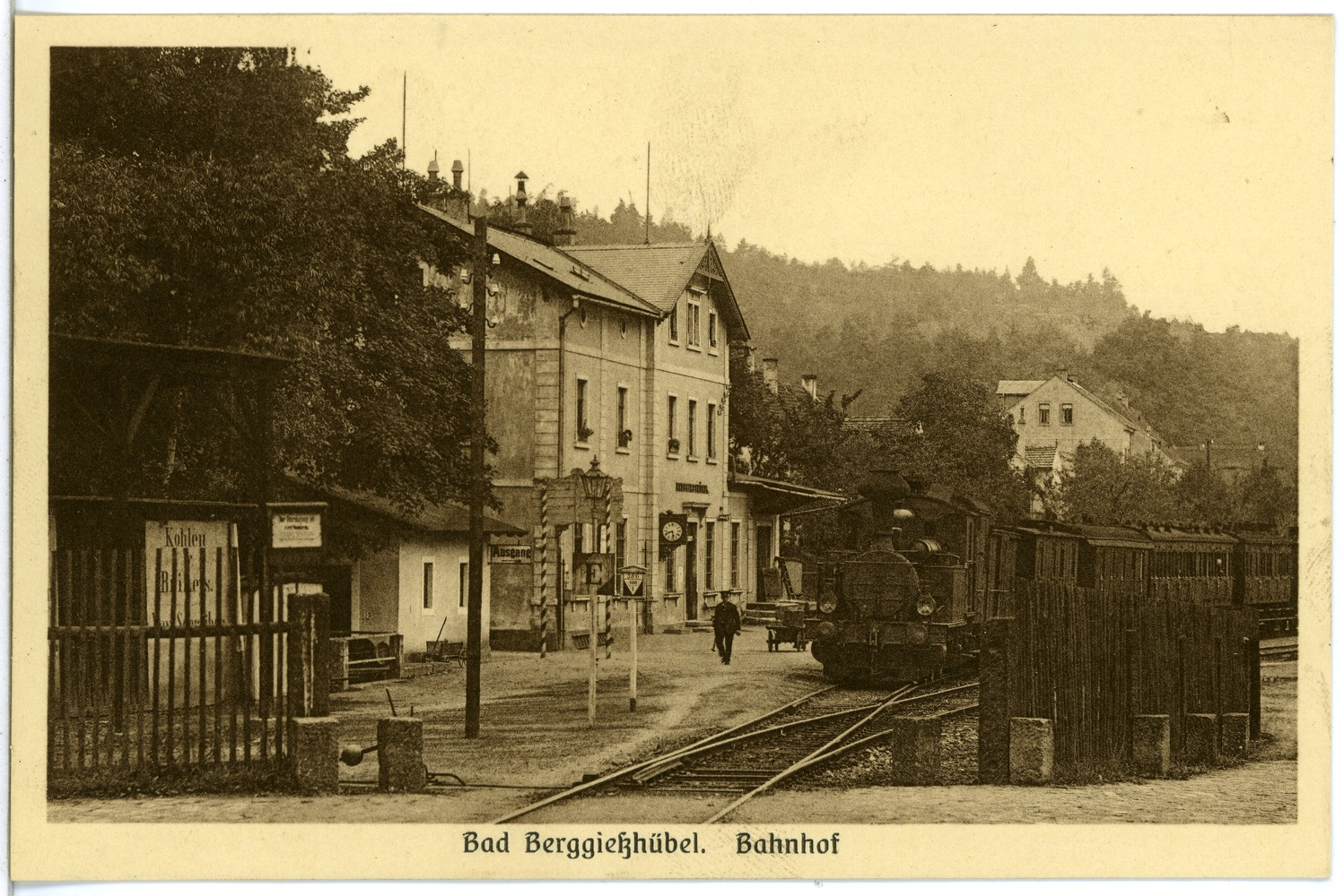 Berggießhübel; Bahnhof mit Eisenbahnzug This postcard is from publisher Brück & Sohn in Meißen ( postcard has a unique number 19626 and is available in a higher resolution at the publisher. This images was uploaded in a cooperation project between Wikipedians and the publisher.